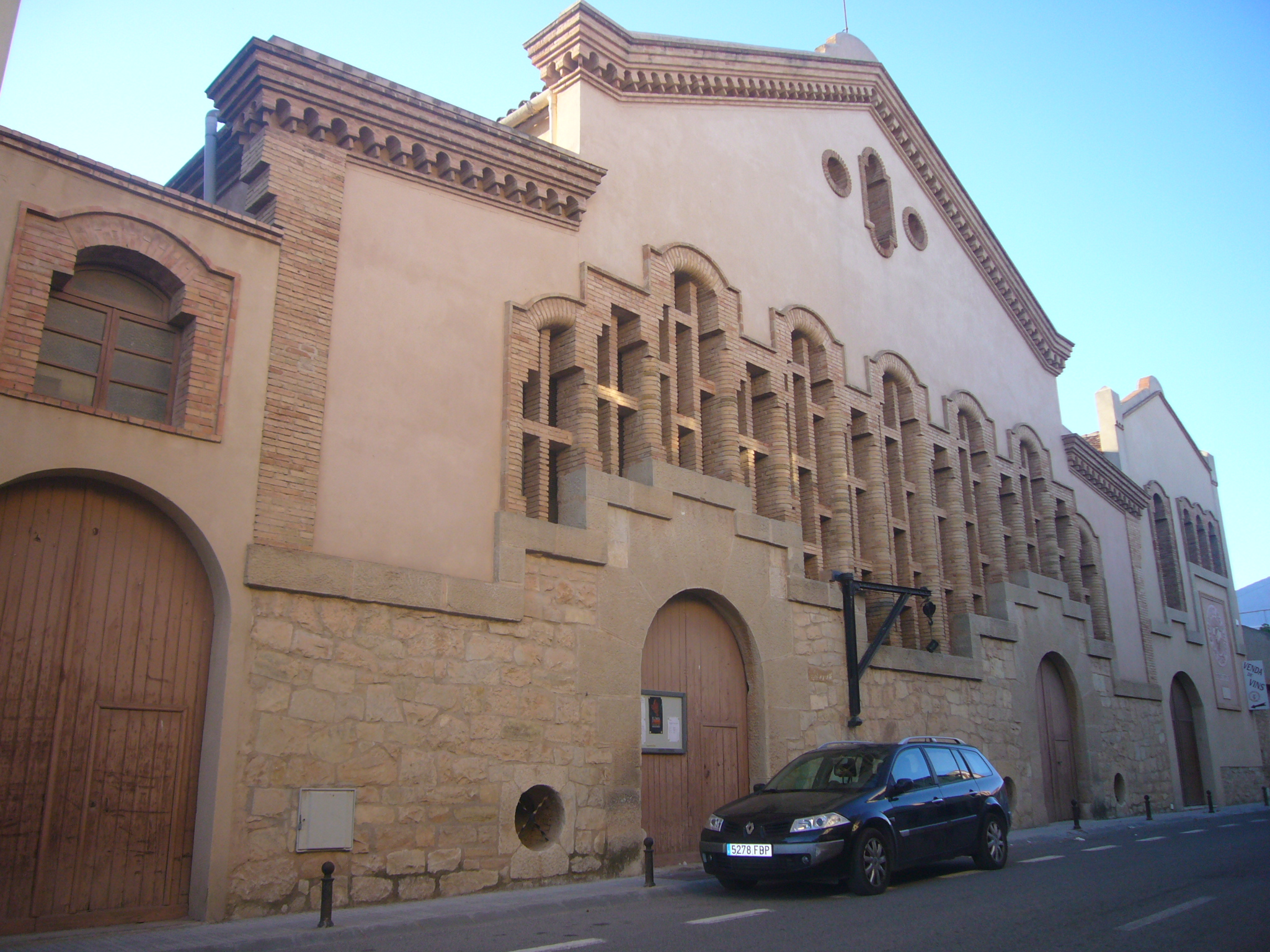 Celler del Sindicat Agrícola de Pira